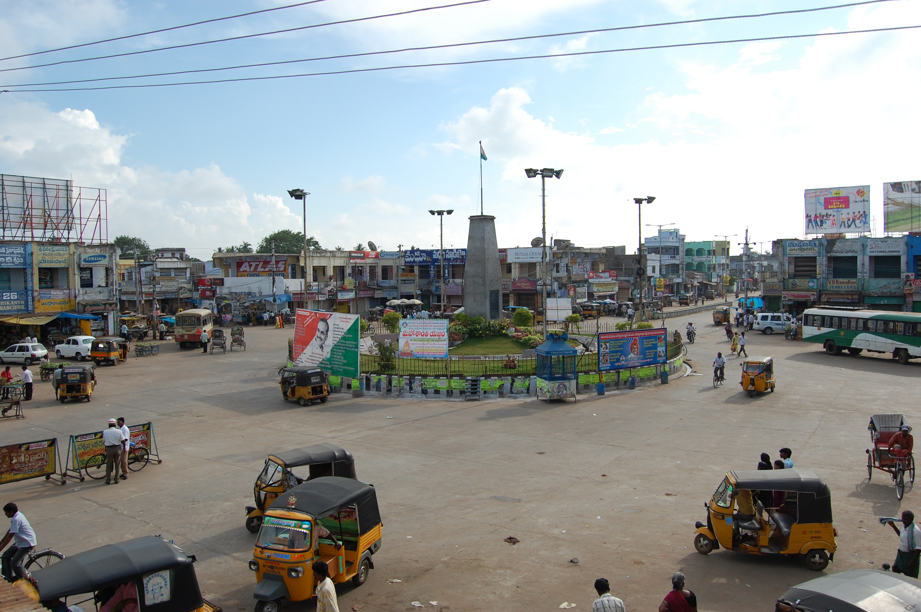 Koneru Center at Machilipatnam, India